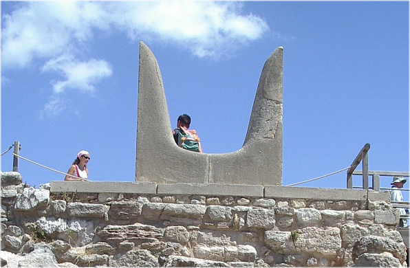 les banyes de Cnossos, foto pròpia